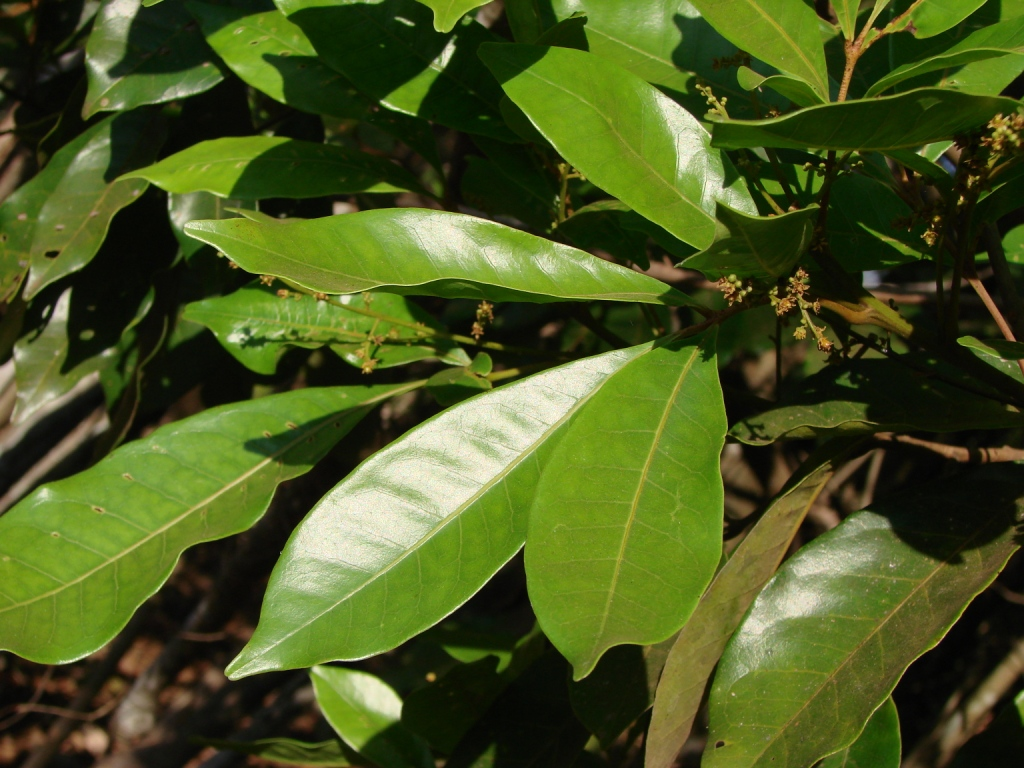 Tapirira guianensis Aubl. - ANACARDIACEAE - Parque Olhos D'Água - Brasília - Distrito Federal - Brasil.